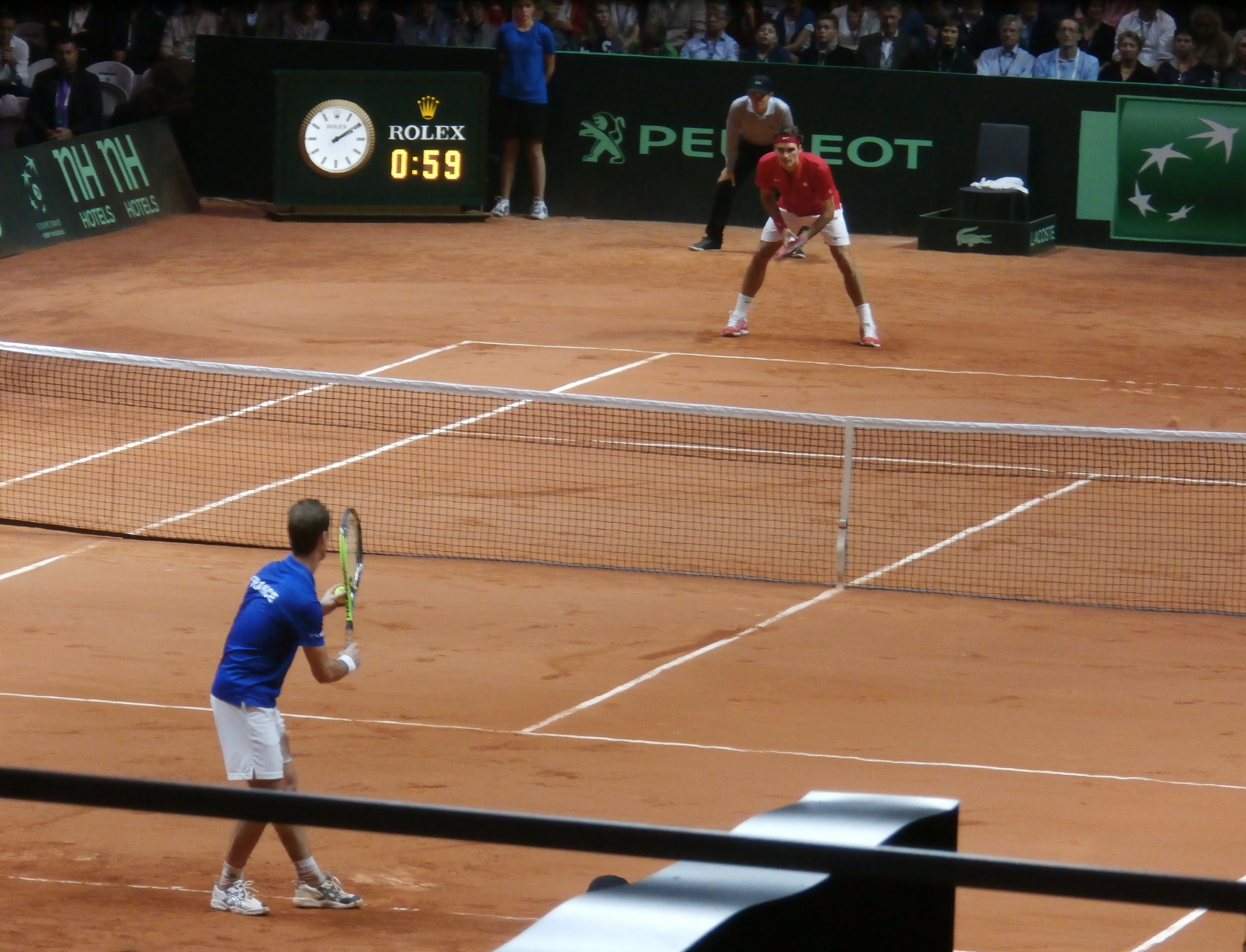 Le dernier match de la finale de la Coupe Davis 2014, entre Roger Federer et Richard Gasquet.